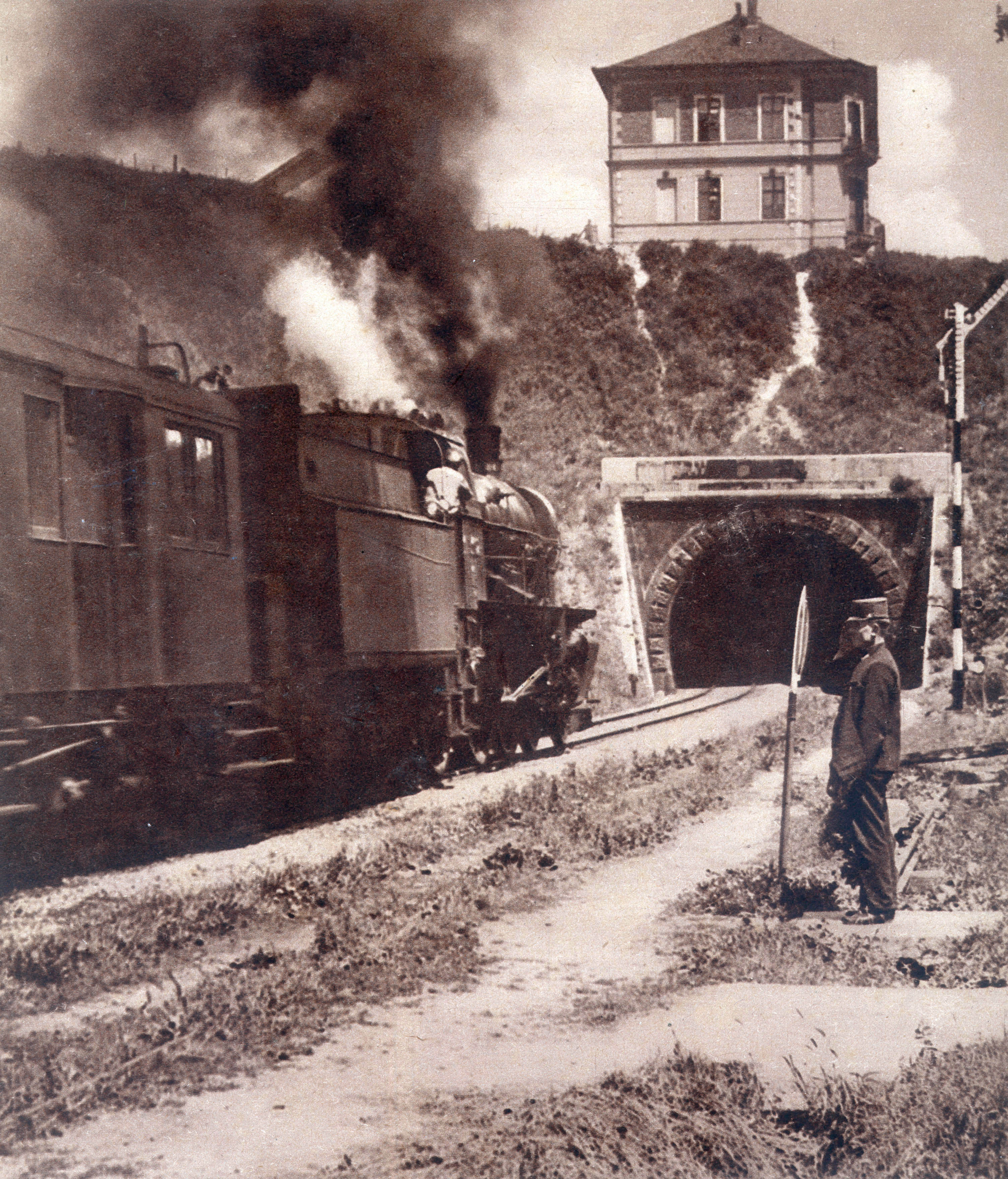 A déli vasút alagútja a Gellért-hegy nyugati lábánál - 1927.